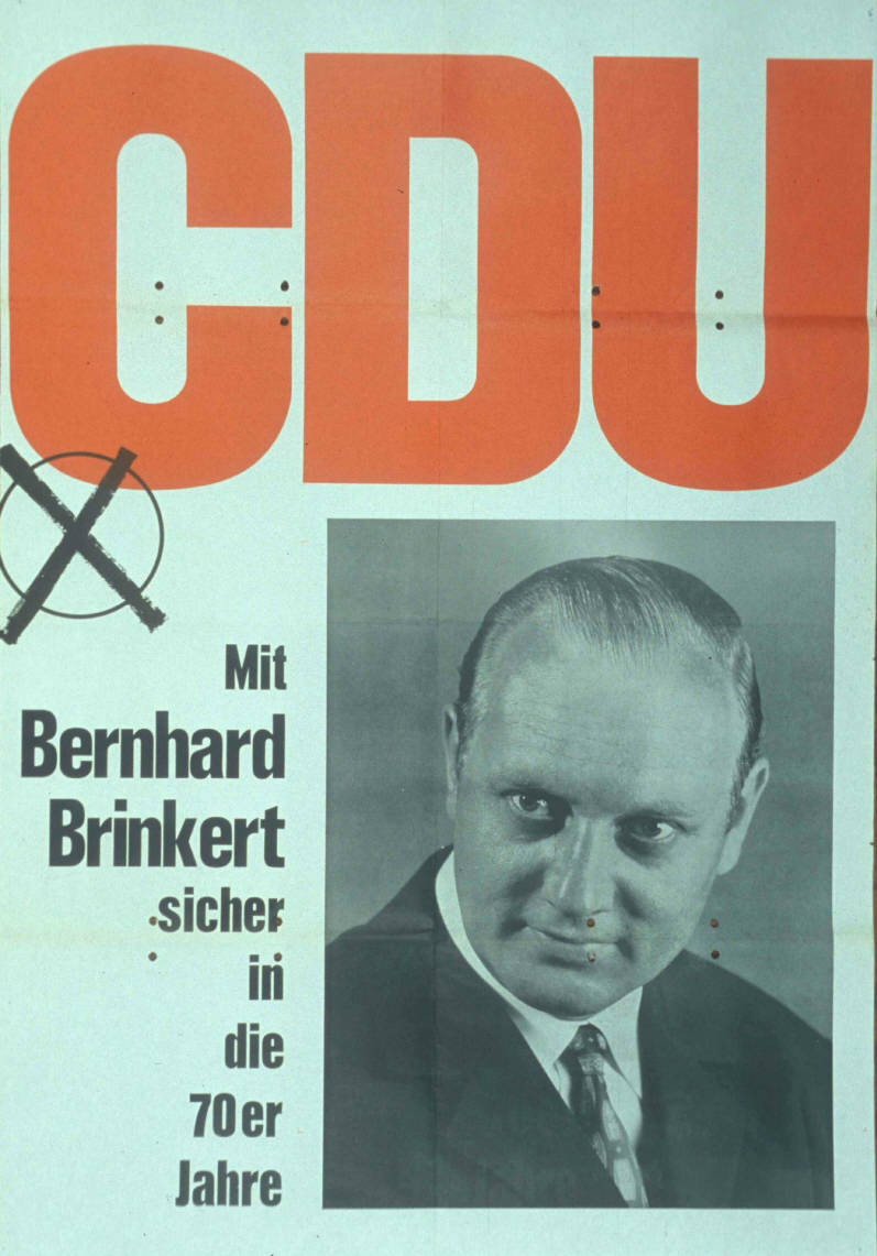 CDU Mit Bernhard Brinkert sicher in die 70er Jahre Abbildung: Porträtfoto -Stimmkreuz Plakatart: Kandidaten-/Personenplakat mit Porträt Objekt-Signatur: 10-001: 1482 Bestand: Plakate zu Bundestagswahlen (10-001) GliederungBestand10-18: Plakate zu Bundestagswahlen (10-001) » Die 6. Bundestagswahl am 28. September 1969 » CDU » Mit Porträtfoto Lizenz: KAS/ACDP 10-001: 1482 CC-BY-SA 3.0 DE